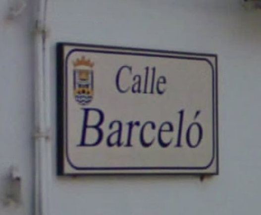 Calle Barceló (cerca de la Calle Héroes del Baleares), San Fernando, Càdiz, España. Include el escudo de San Fernando en la esquina superior izquierda.